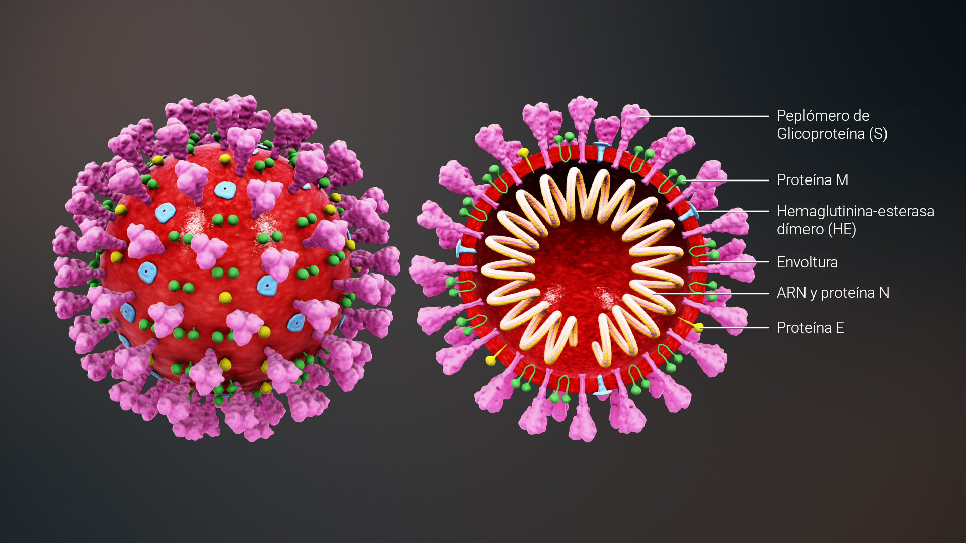 Animación ilustrativa de un coronavirus representativo de Orthocoronavirinae basado en datos de microscopio electrónico. La imagen muestra una sección transversal del modelo indicando algunos componentes que pueden estar presentes en su estructura. La existencia de las proteínas específicas es variable de acuerdo al genoma de cada especie.